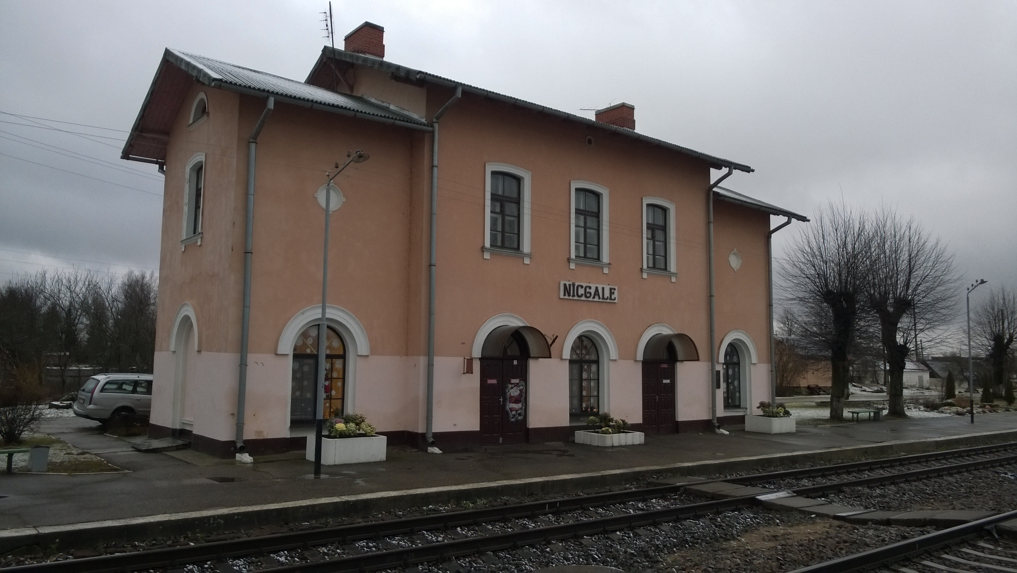 Nīcgale, Nīcgale Parish, LV-5463, Latvia